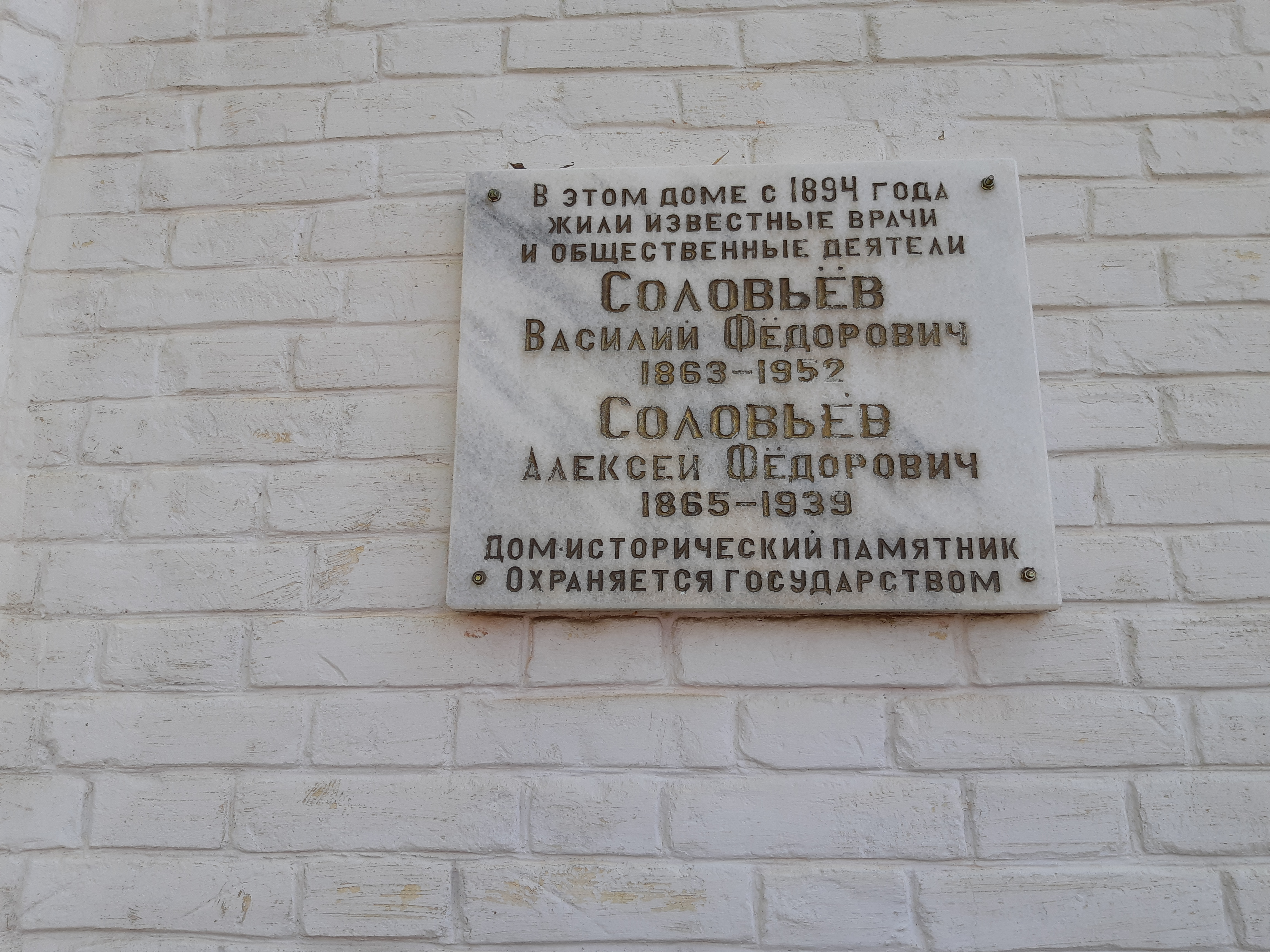 Дом, в котором в разные годы жили революционеры А.Ф.и В.Ф. Соловьевы, военный деятель И.И. Петрожицкий и бывали революционеры А.А. Жулковский, И.П. Покровский, Л.Ф. Герус: улица Победы, 6, Майкоп, Адыгея